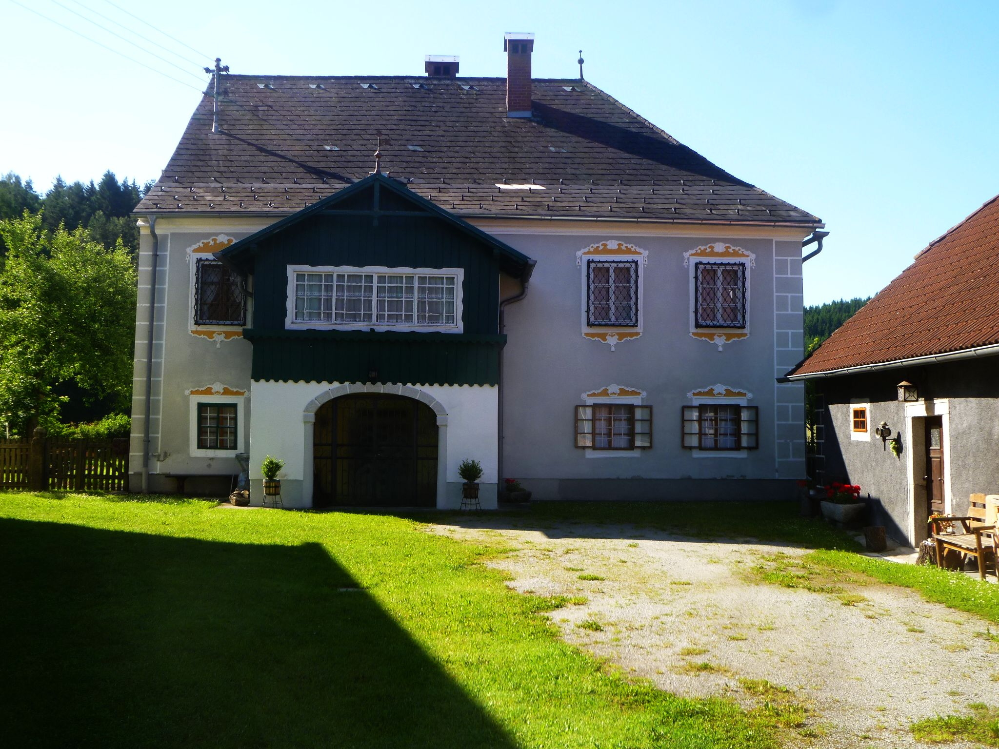 Gewerkenhaus und Pferdestall, Rößlhammer